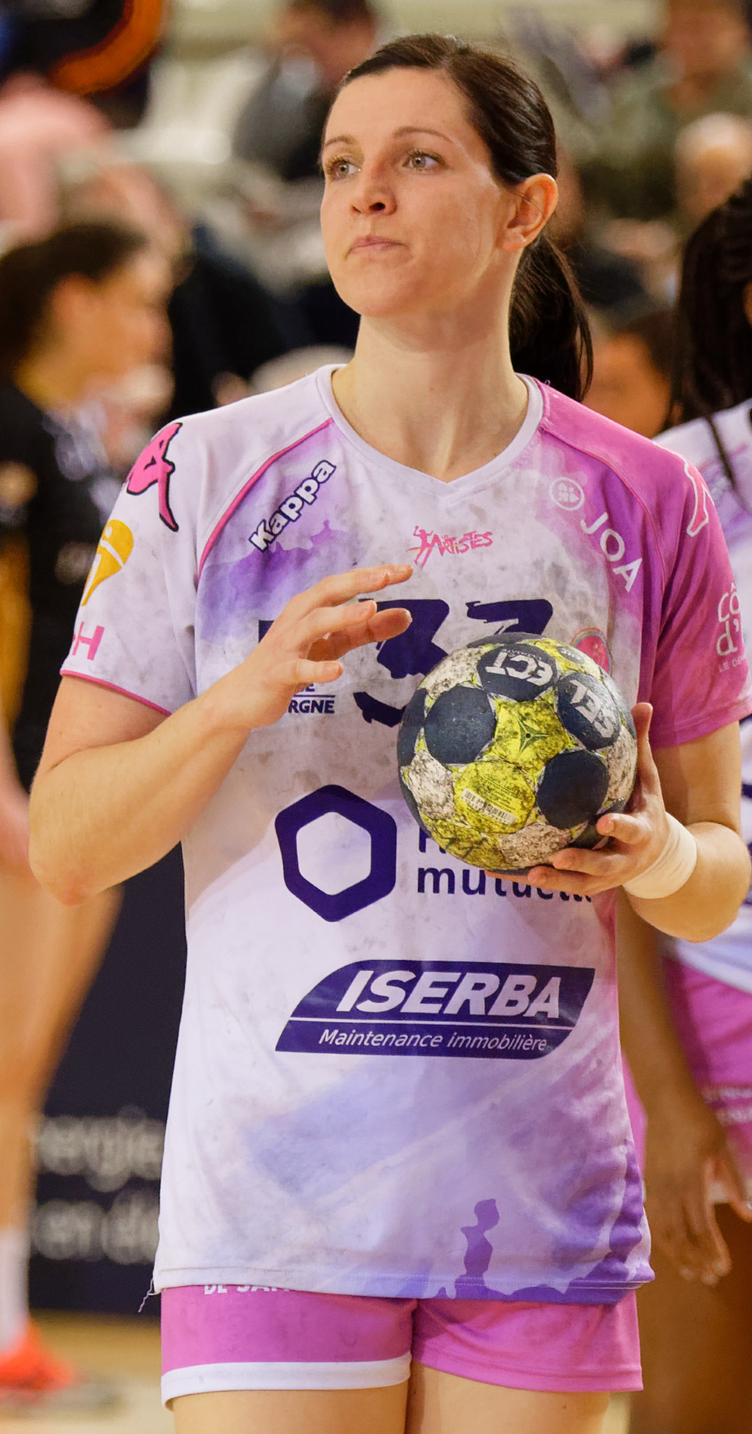 Rencontre entre Issy Paris Hand et Dijon. A Issy Les Moulineaux, le 25 février 2018.